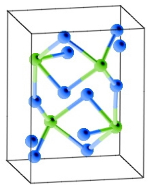 Орторомбична решетка цементита